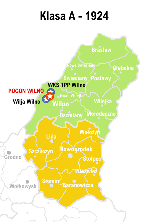 Rozgrywki w piłce nożnej w Wileńskim OZPN w 1924 roku